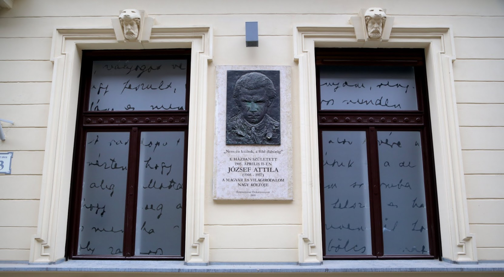 Bp. Gát utca 3, - József Attila szülőháza